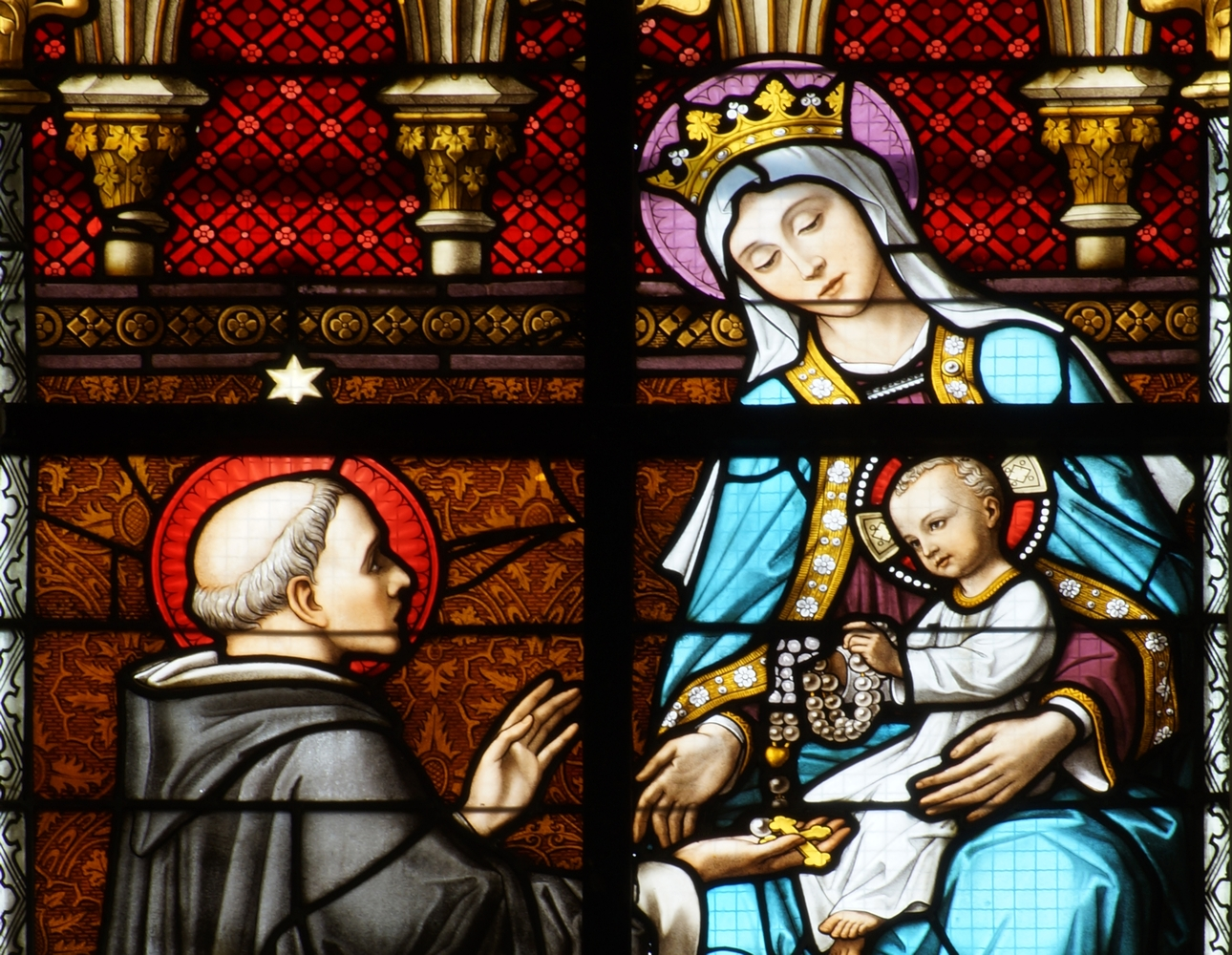 Sint-Willibrorduskerk (Merksplas) - Glasraam De Rozenkrans (detail) gemaakt door Jean-Baptiste Capronnier (anno 1881)